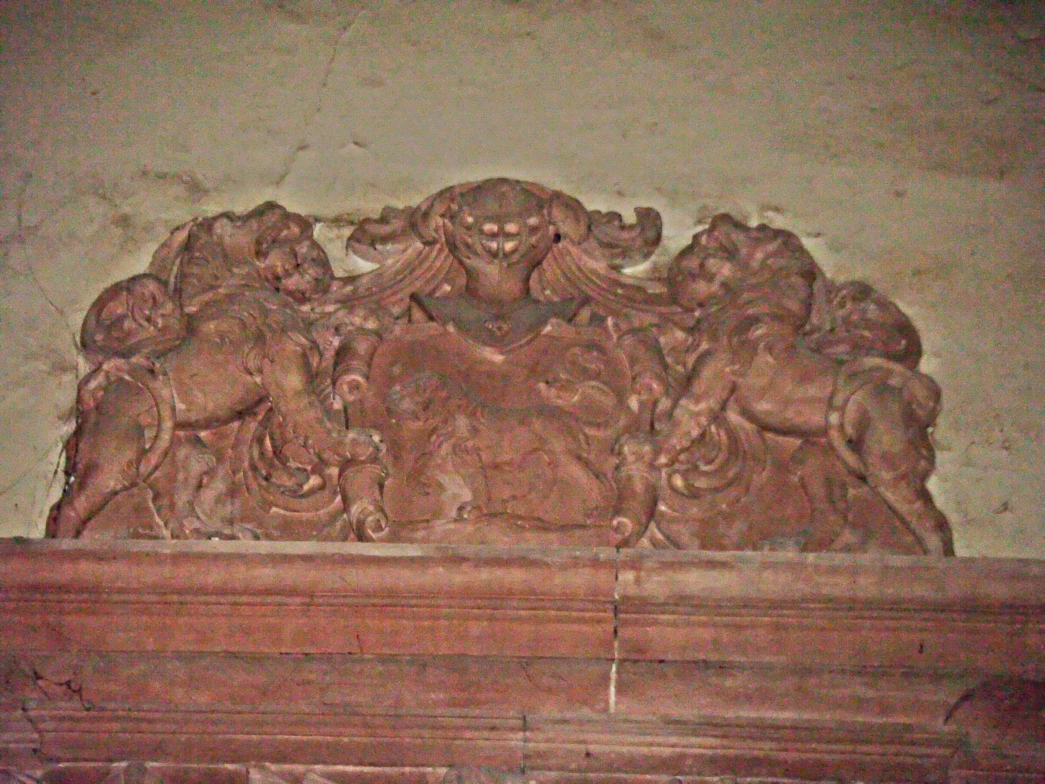 Landau in der Pfalz, Katharinenkapelle, Grabmal des Generals Hartmann Samuel Hoffmann von Löwenfeld (1653-1709), Wappenkartusche